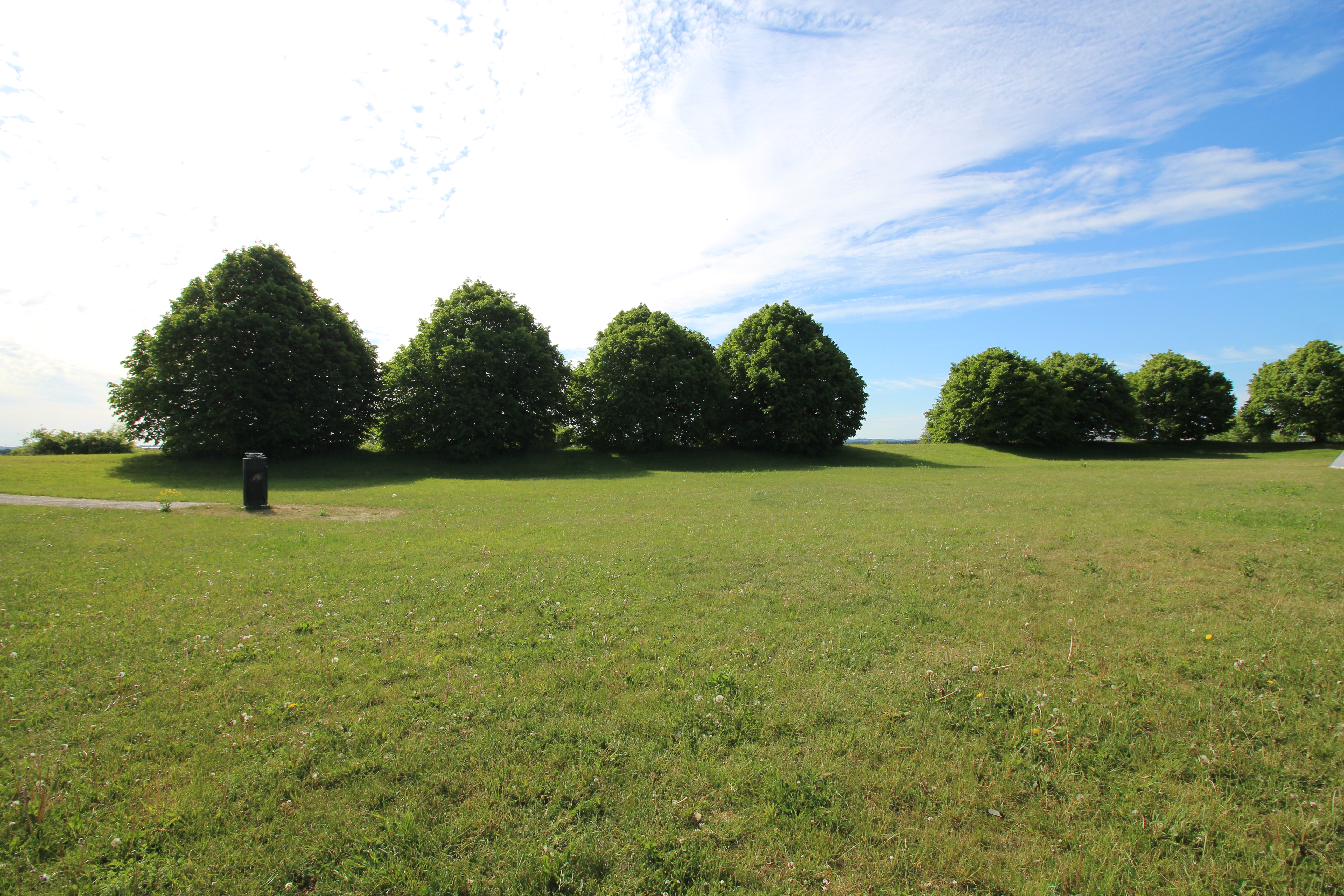 Johannelundstoppen i Hässelby-Vällingby stadsdel, Stockholms kommun, Sverige